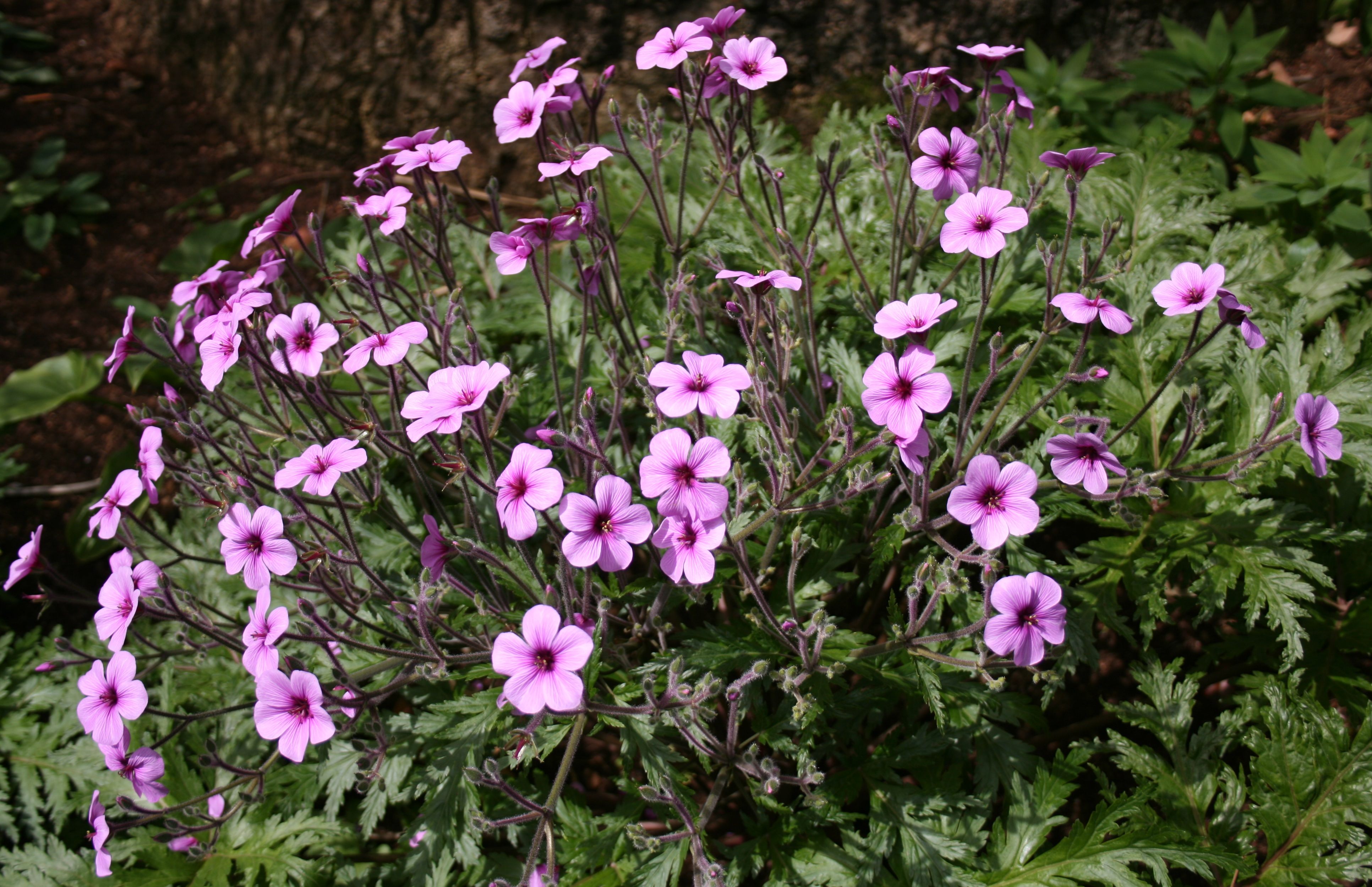 Funchal_-_Botanischer_Garten